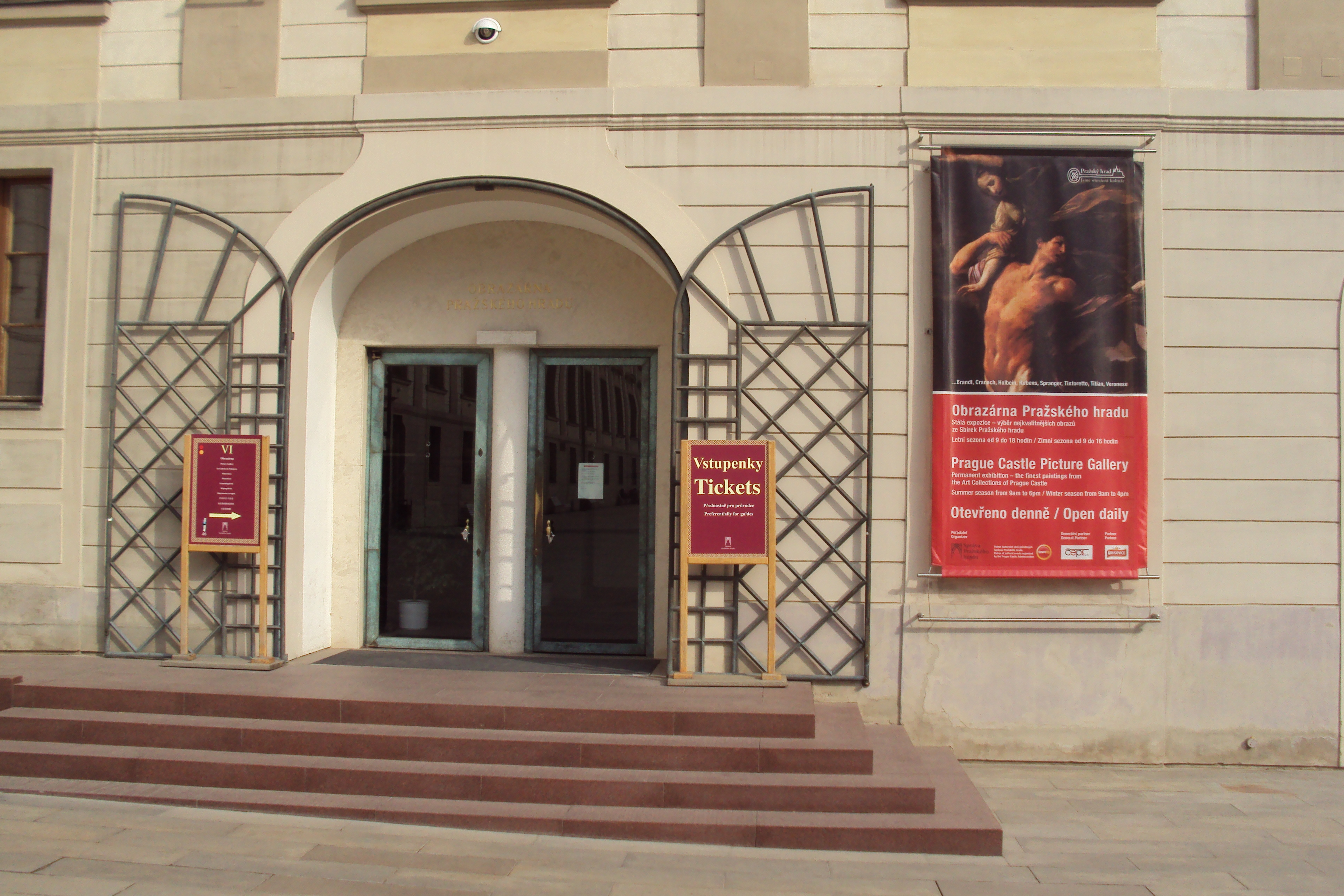 Vchod do Obrazárny Pražského hradu, Hradčany, 2. nádvoří